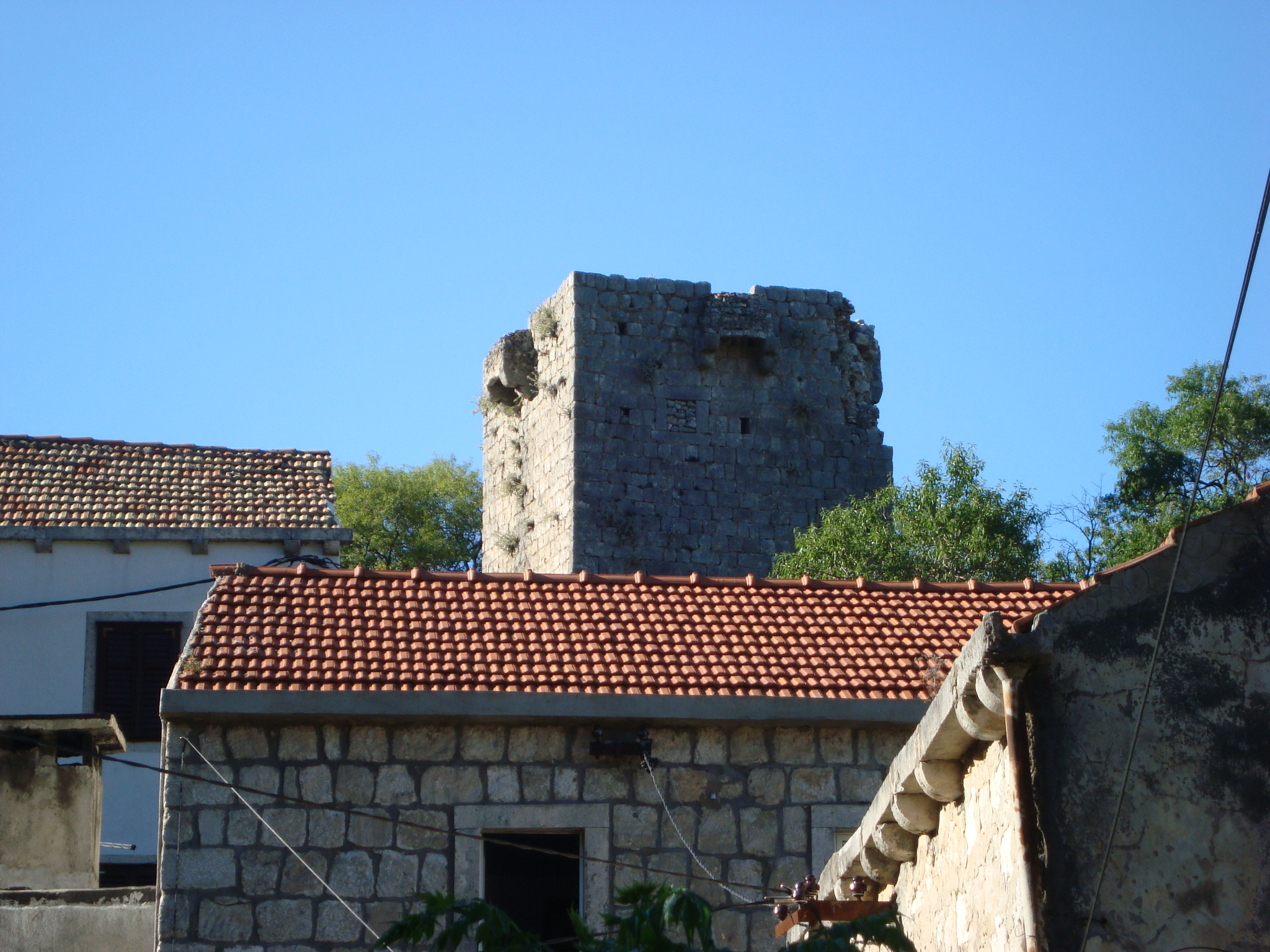 Srednjovjekovna kula za obranu od gusarskih napada u Prožuri, Mljet, Hrvatska